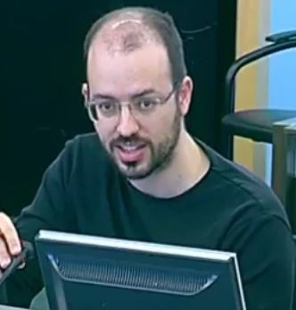 Jorge Luis Bail en février 2018.